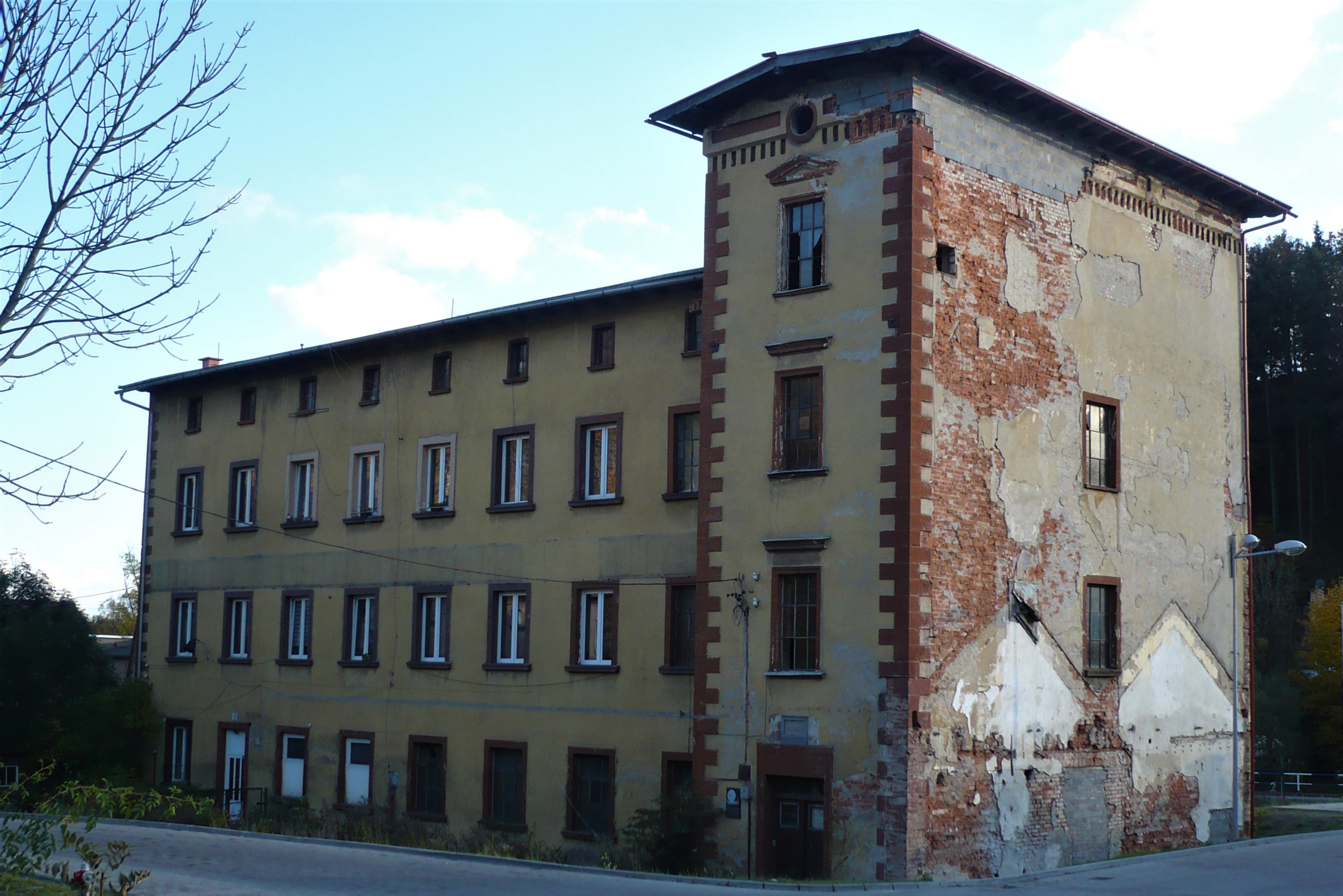 Ludwikowice Kłodzkie. Relikt przemysłowy: budynek biurowo-magazynowy, ul. Główna 19